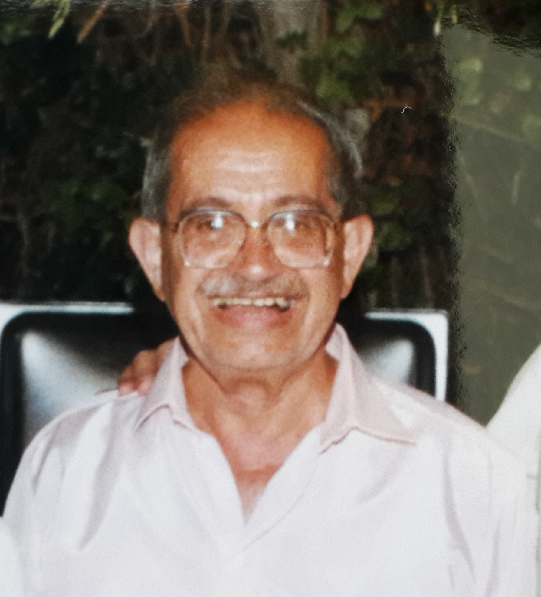 העורך הספרותי ברוך חפץ